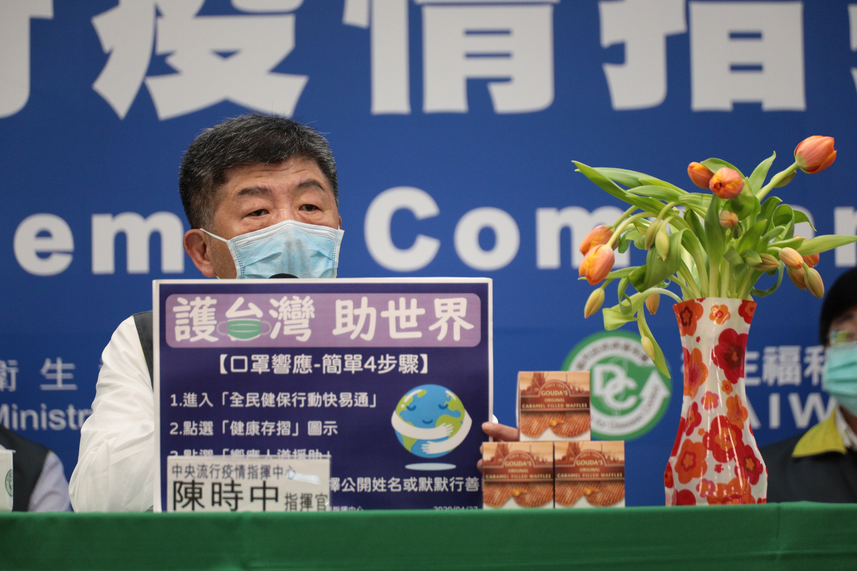 陳時中部長介紹“護台灣助世界”政策。旁邊展示著由荷蘭政府贈送的鬱金香與餅乾。